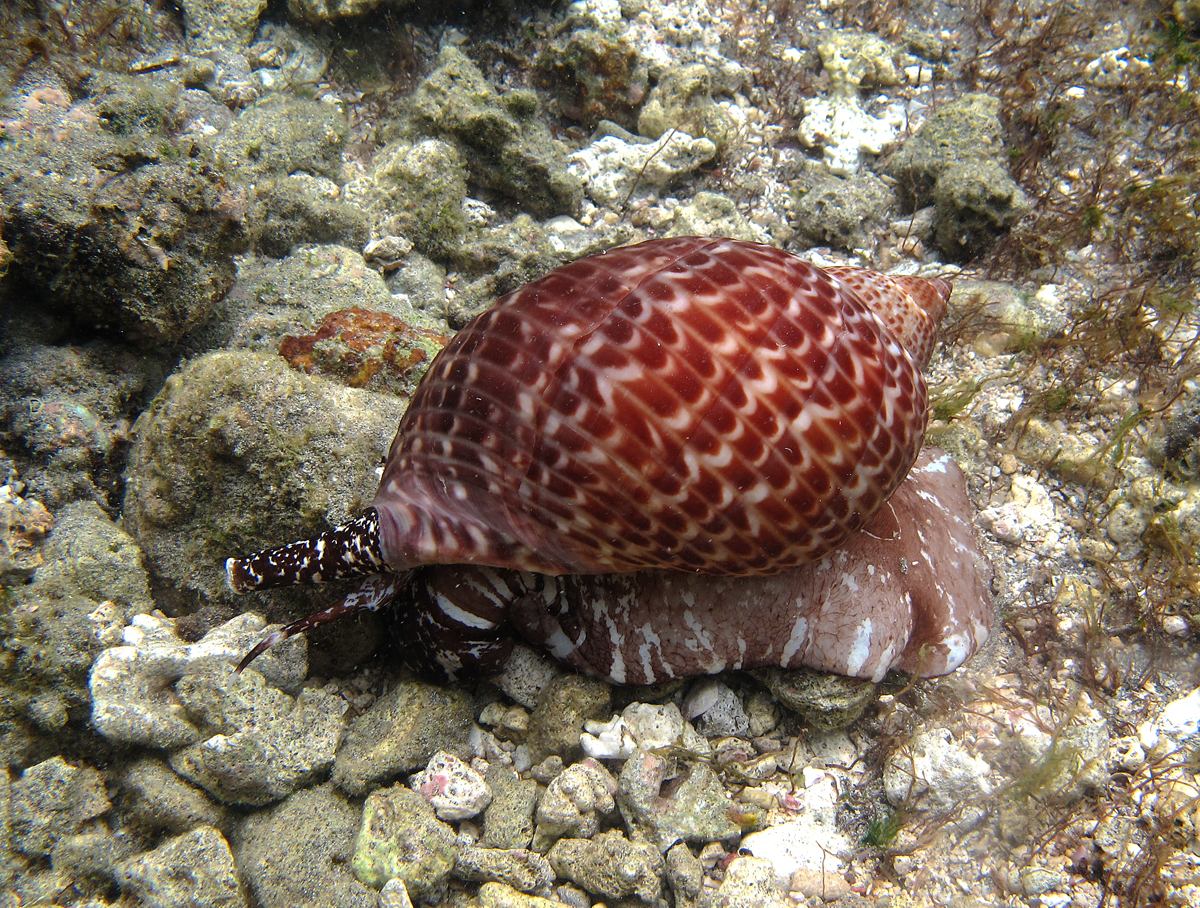 Le coquillage Tonna perdix à la Réunion.